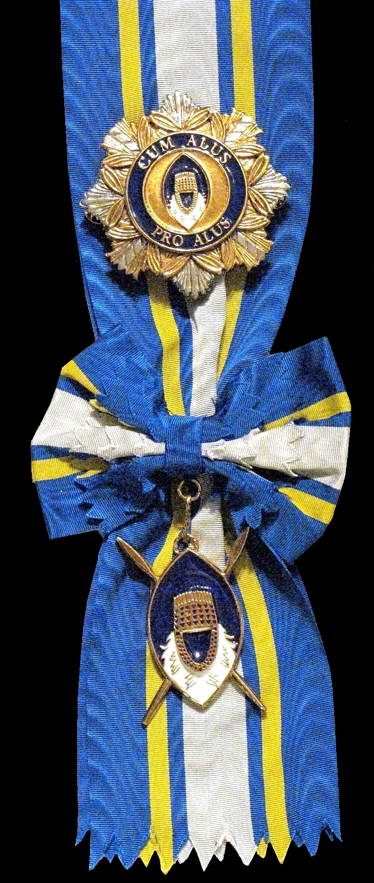 Royal Order of The Engabu